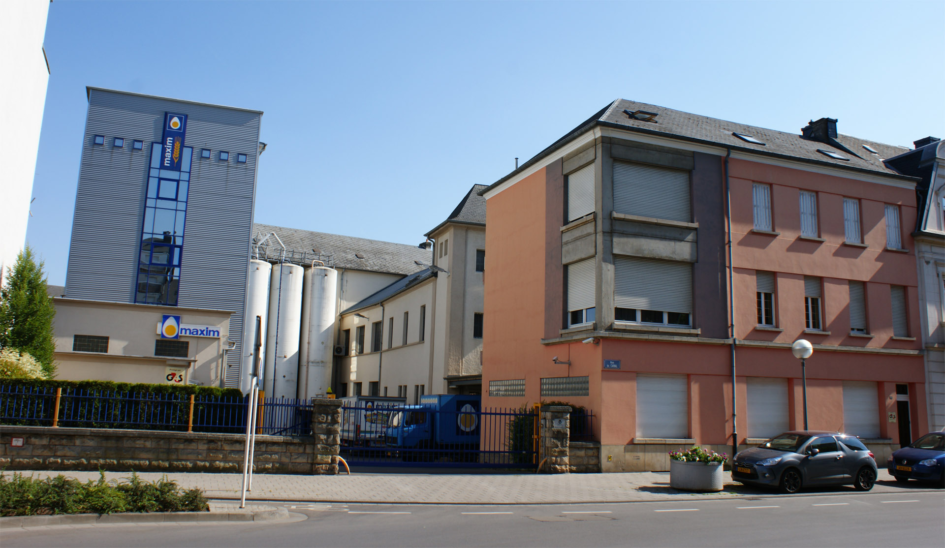 D'Fabrik vu Maxim Pasta zu Esch-Uelzecht an der Kanalstrooss. Juni 2011